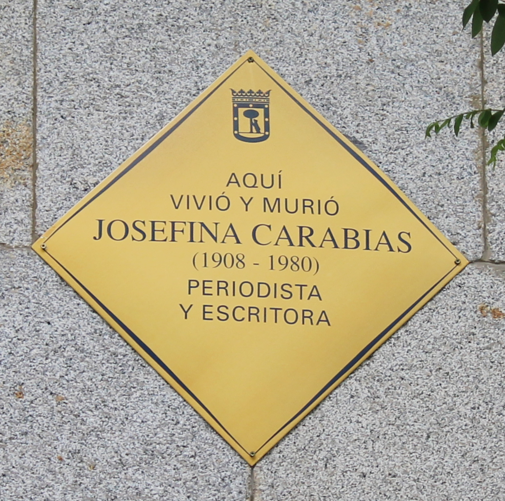 Aquí vivió y murió Josefina Carabias (1908-1980), Madrid.